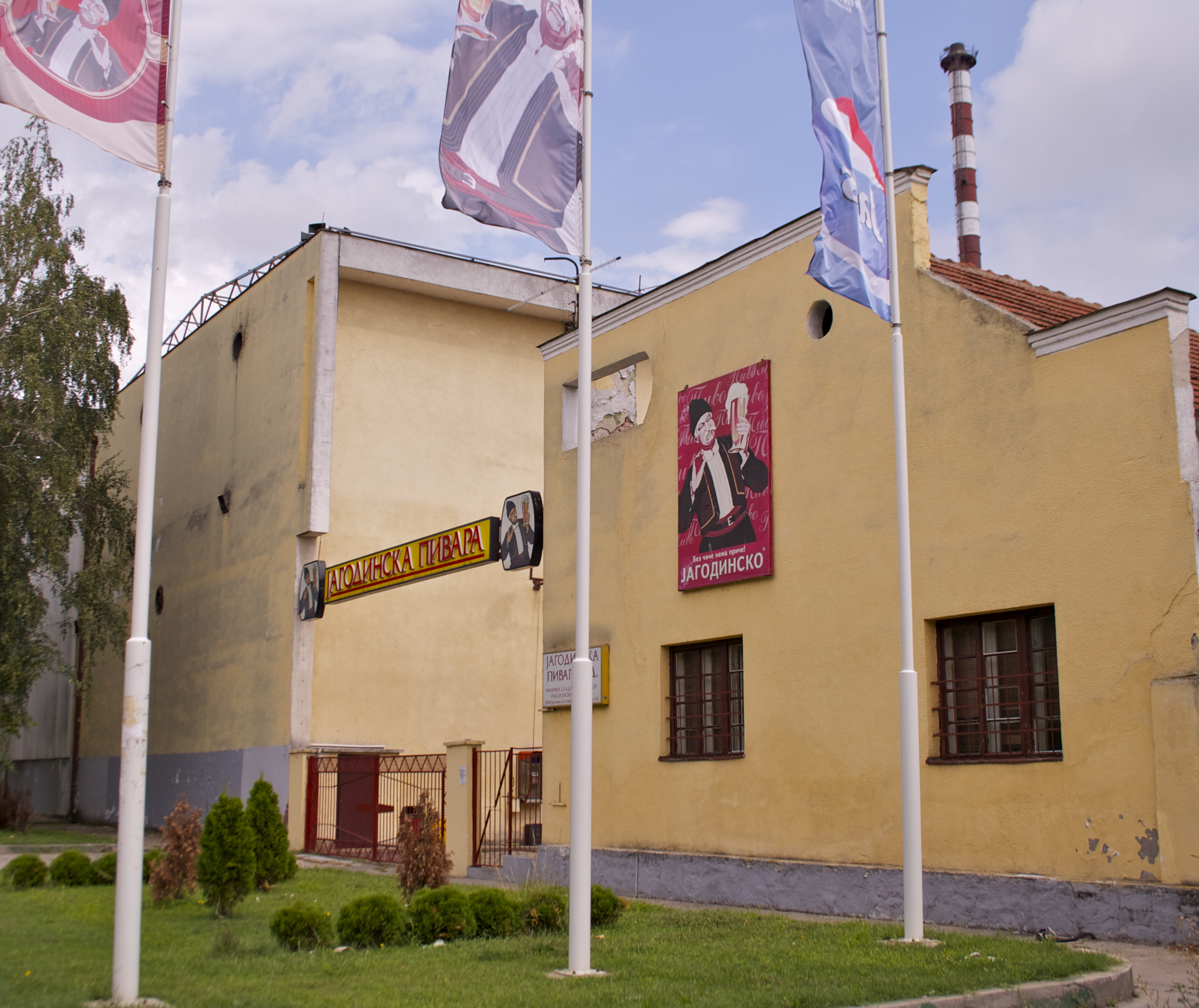 Јагодинска пивара